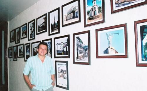 Maurico Cardim - fotógrafo brasileiro